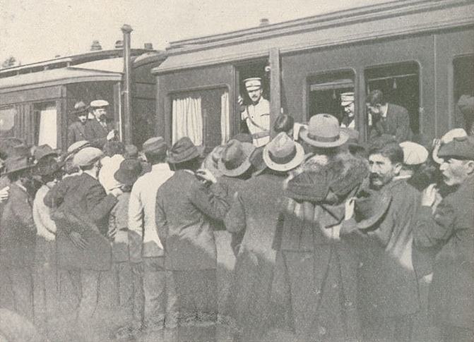 Fotografia de Sidónio Pais a passar pela estação de Vendas Novas a caminho de Évora, em Portugal. Esta imagem foi publicada na Ilustração Portuguesa n.º 627 (Série II), de 25 de Fevereiro de 1918, e digitalizada pela Hemeroteca Municipal de Lisboa.